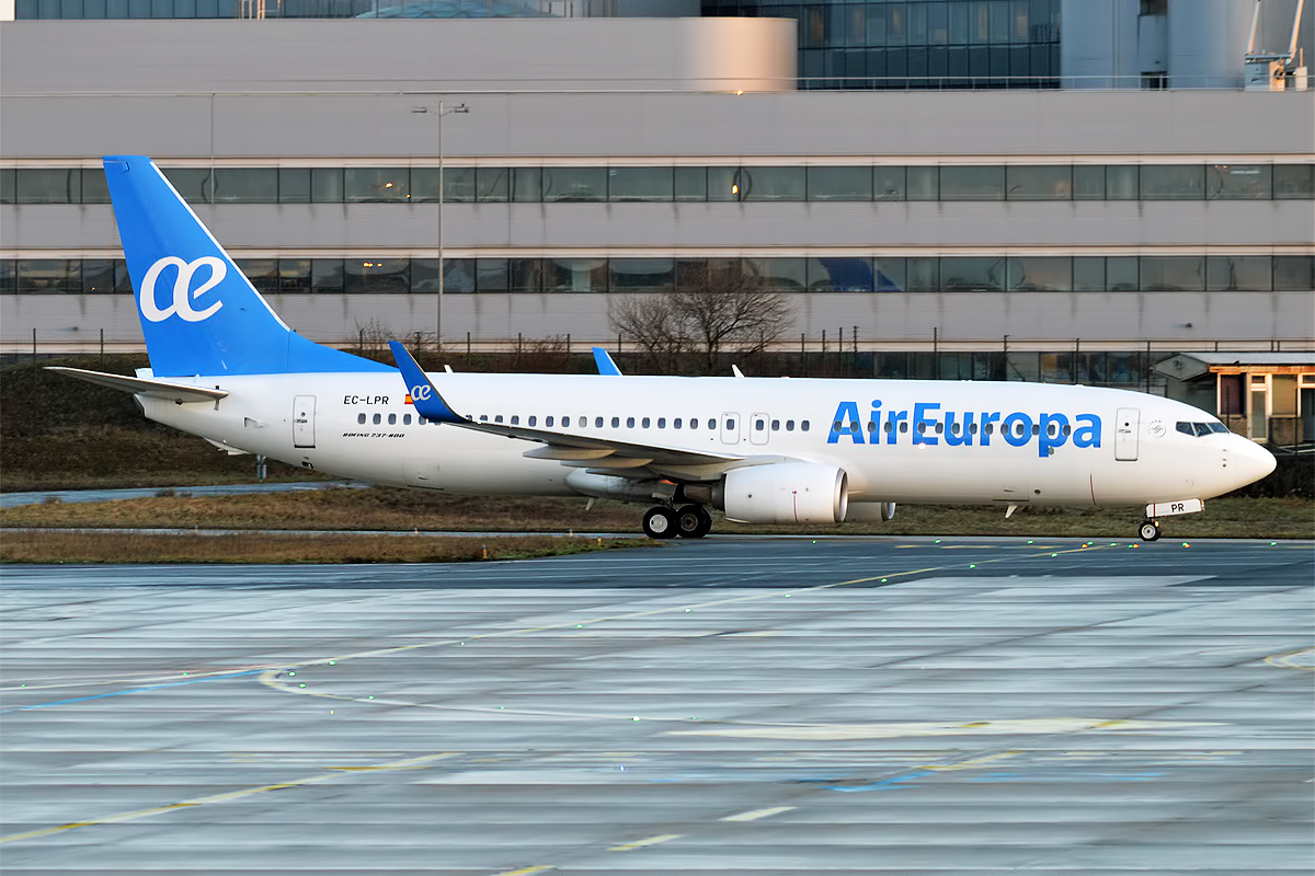 Air Europa, EC-LPR, Boeing 737-85P